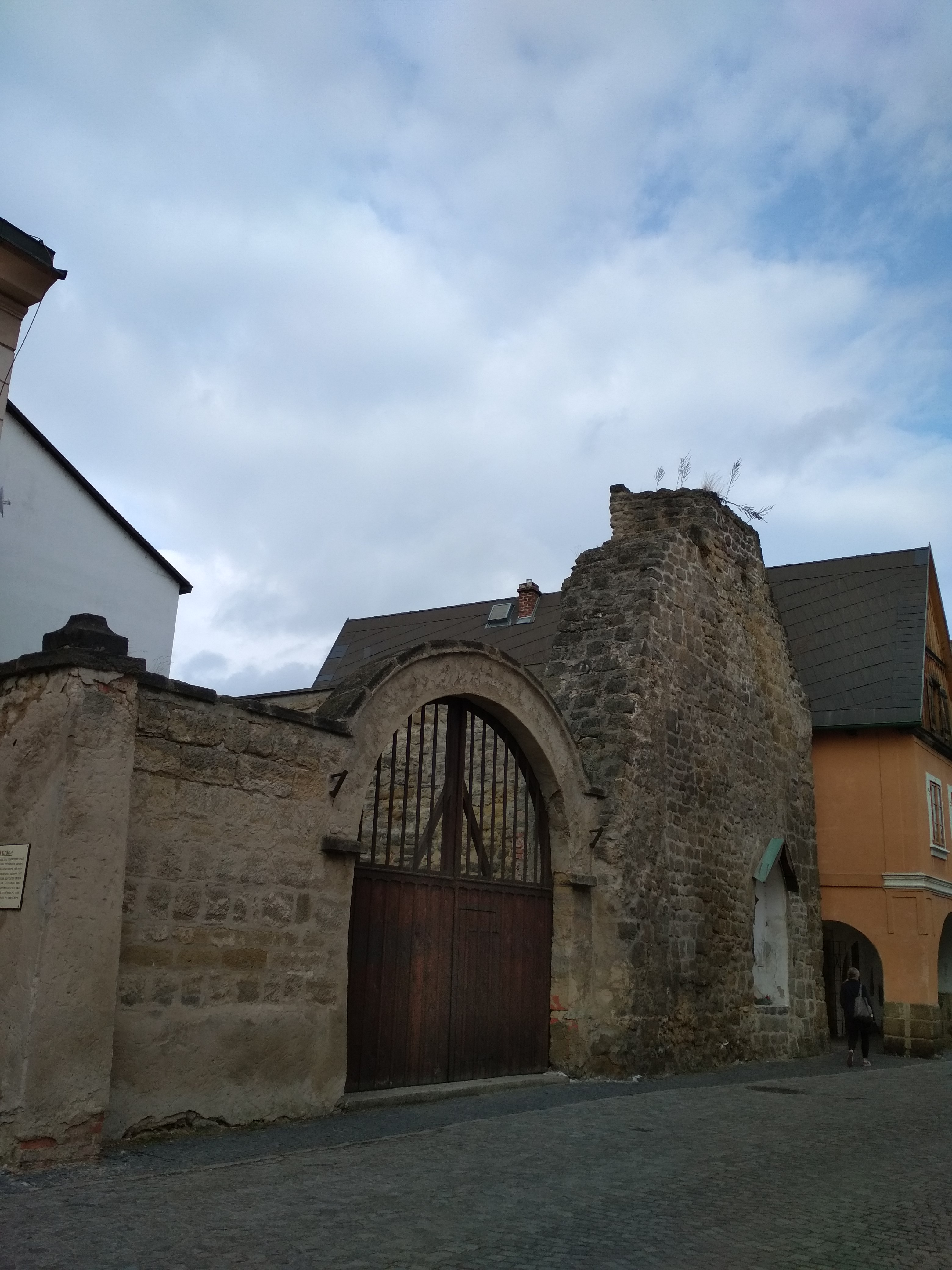 Západní brána v Úštěku, pohled od jihu